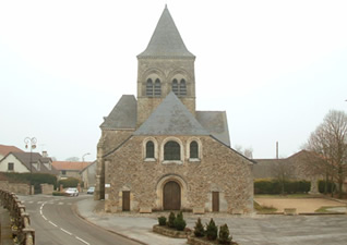 Eglise Saint-Martin à Berru